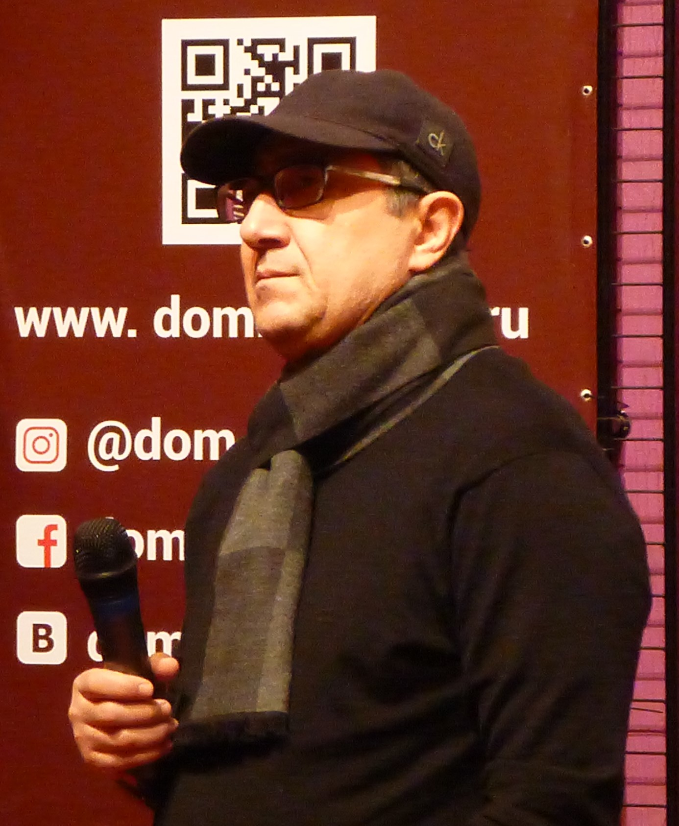 Юсуп Сулейманович Разыковв Доме кино в Екатеринбурге 2019 год